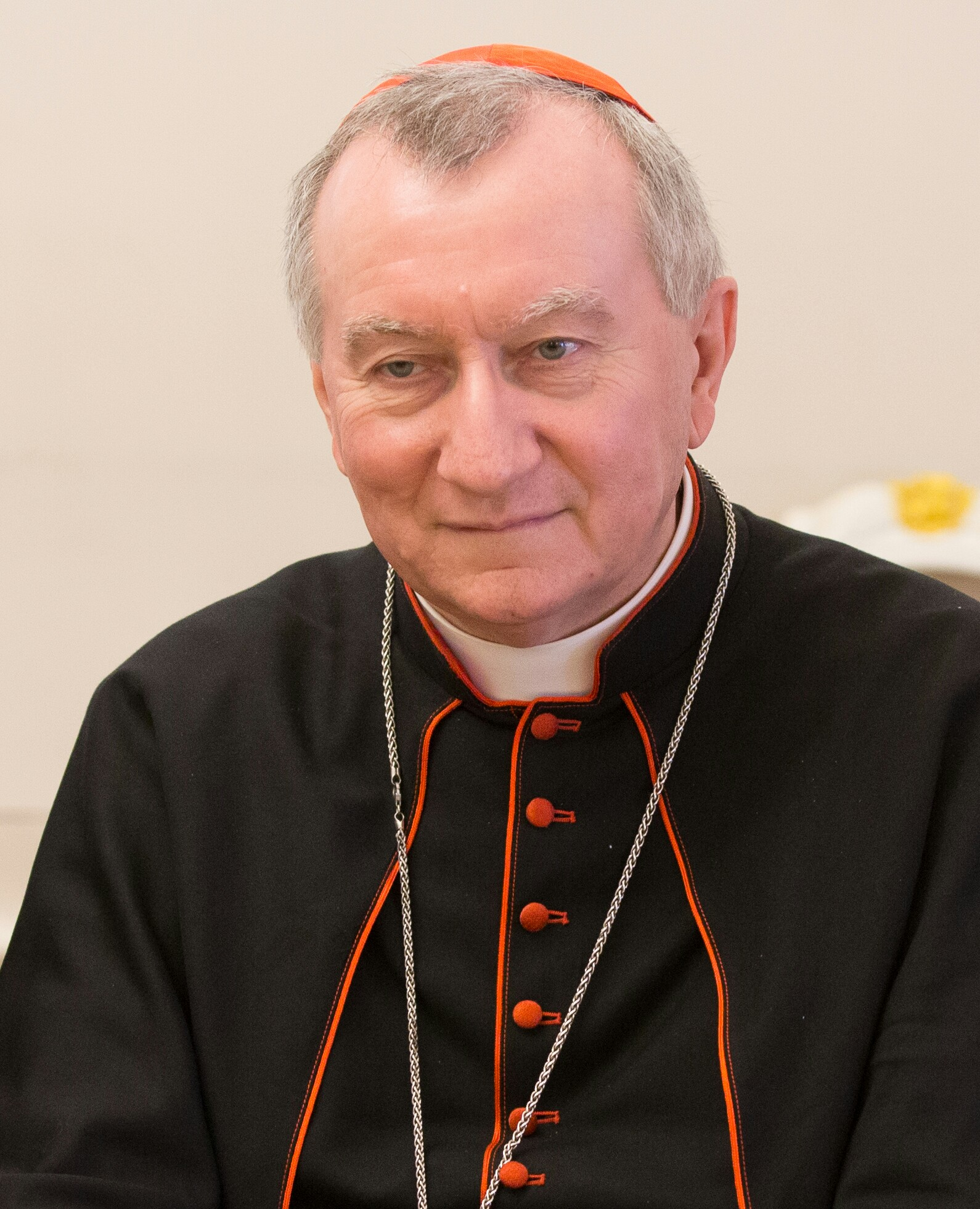 kard.Pietro Parolin (12 maja 2016)